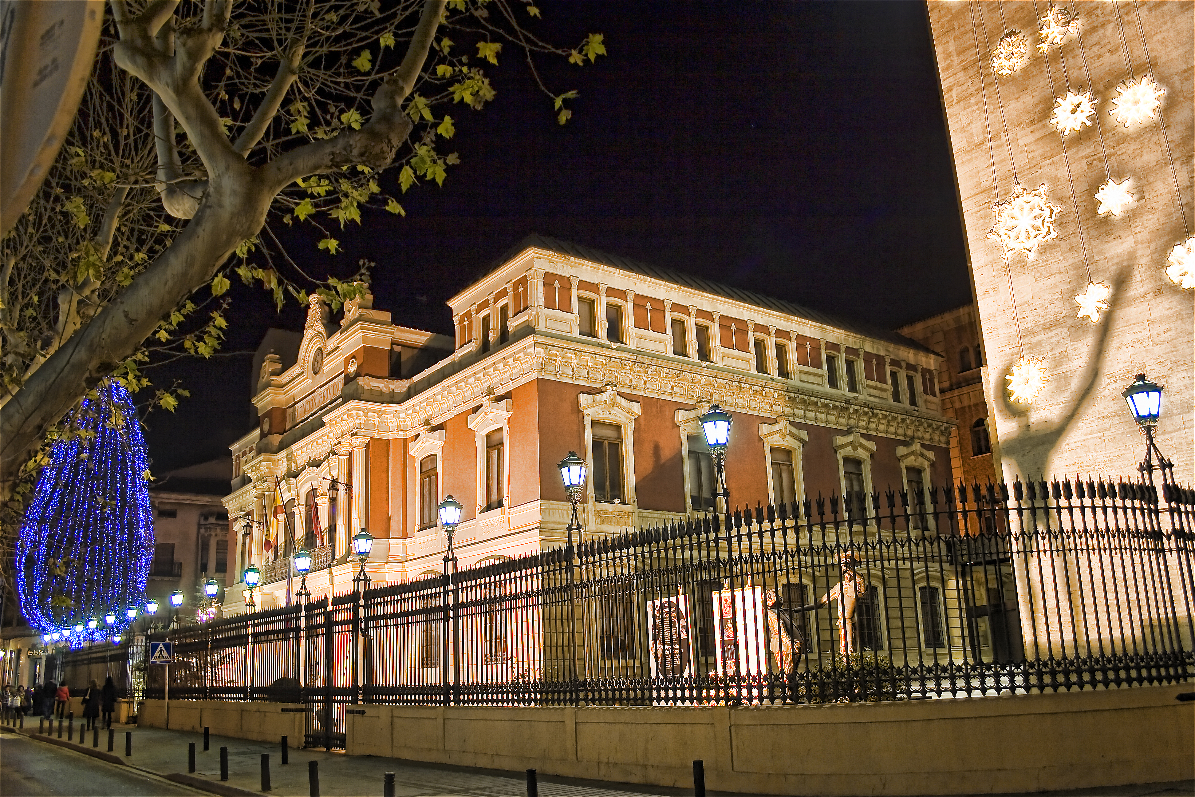 "La Dipu" con iluminación navideña... el árbol azul del fondo y las estrellas señaladas por la sombra de Don Quijote. Se puede ver en